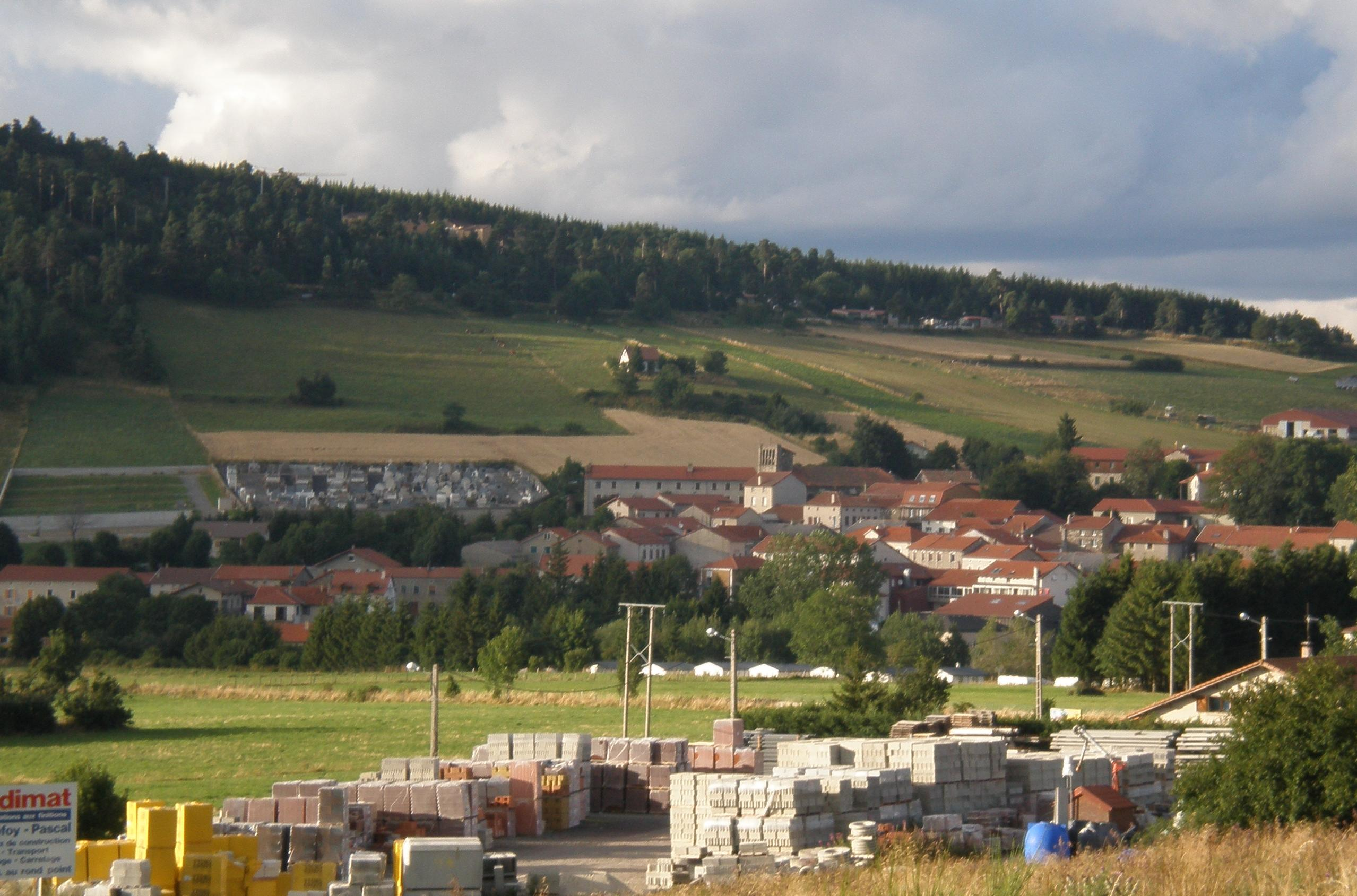 Le village de Coucouron (Ardèche)